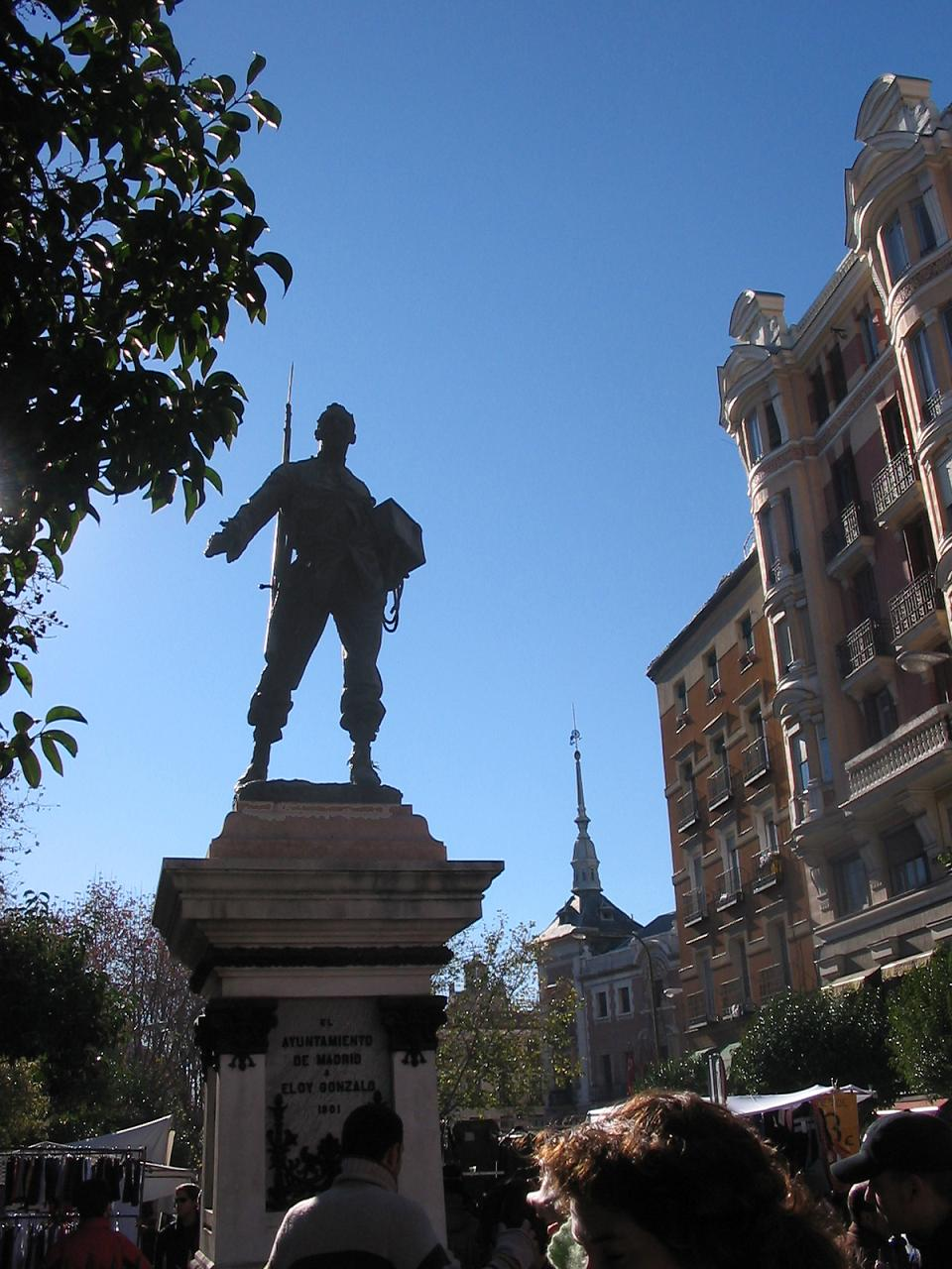 Esta estatua se encuentra en la plaza de Cascorro de Madrid, es el héroe de la guerra con cuba Eloy Gonzalo, soldado madrileño, quien llevó a cabo en el año 1896 la arriesgada hazaña de ir él solo, con una lata de petróleo, a prender fuego al paraje donde estaban unos defensores de la independencia cubana. Las fotos están realizadas en Domingo, día de rastro en Madrid.